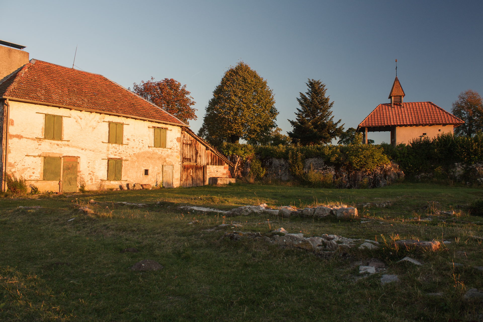 Site archéologique du Saint-Mont à Saint-Étienne-lès-Remiremont, 48° 01′ 17″ Nord, 6° 38′ 03″ Est.